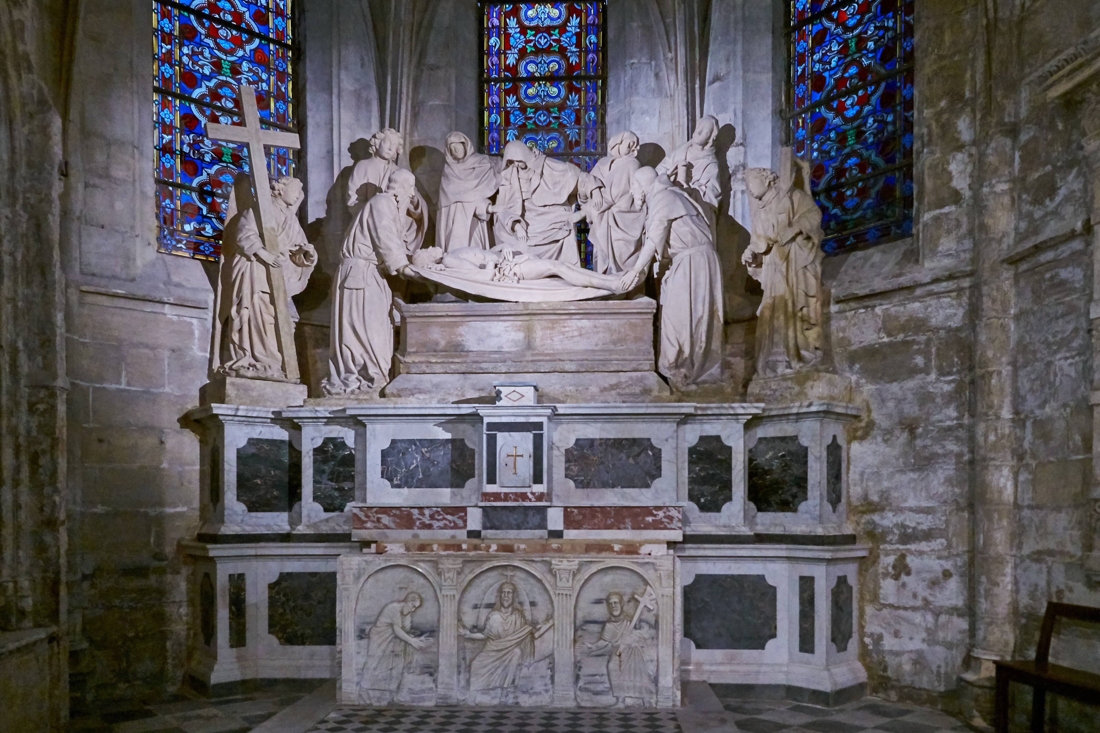 Arles - Sainte Trophime - Mise au tombeau